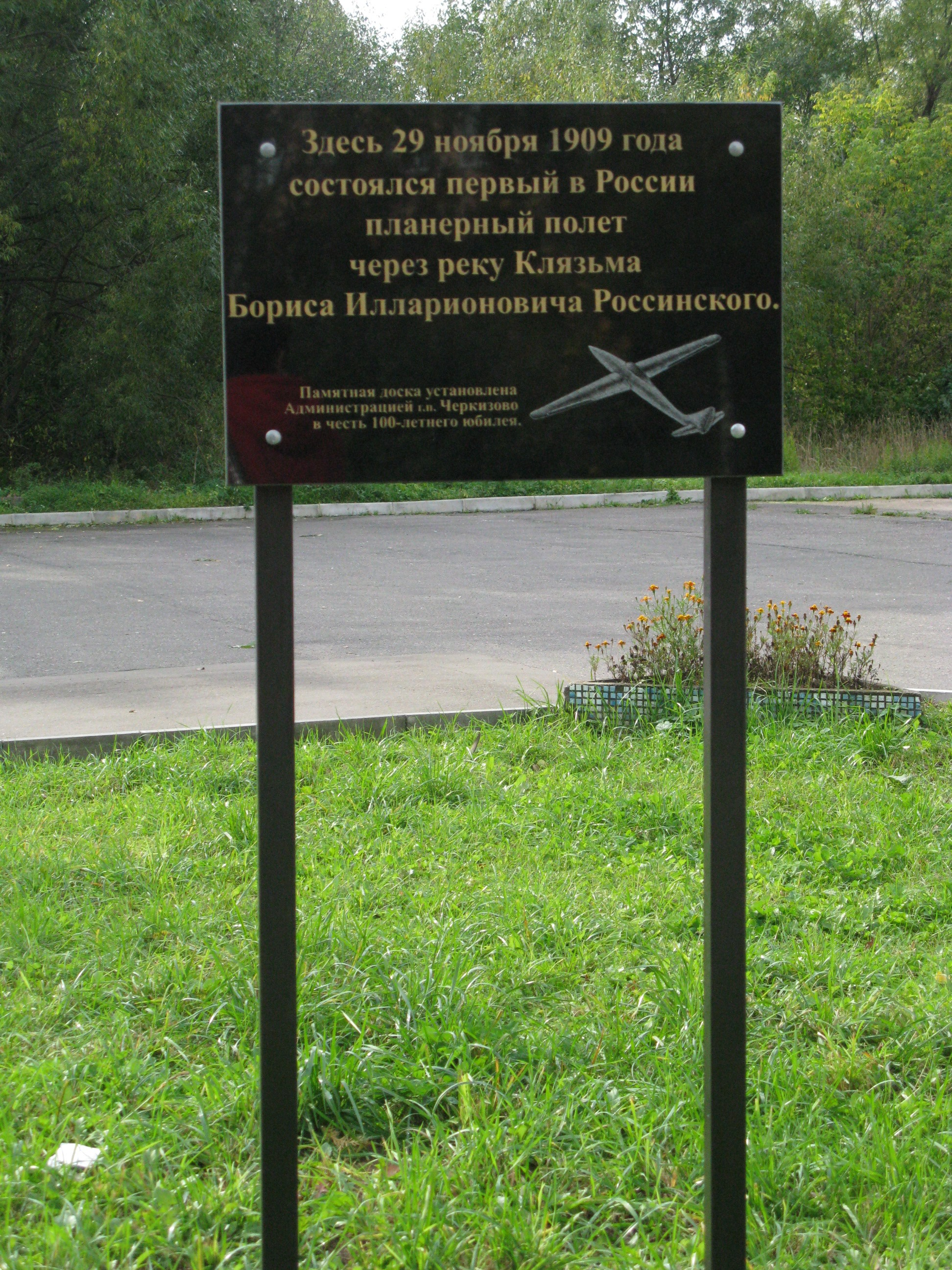 Мемориальная доска в память 100-летнего юбилея первого русского планерного полёта.